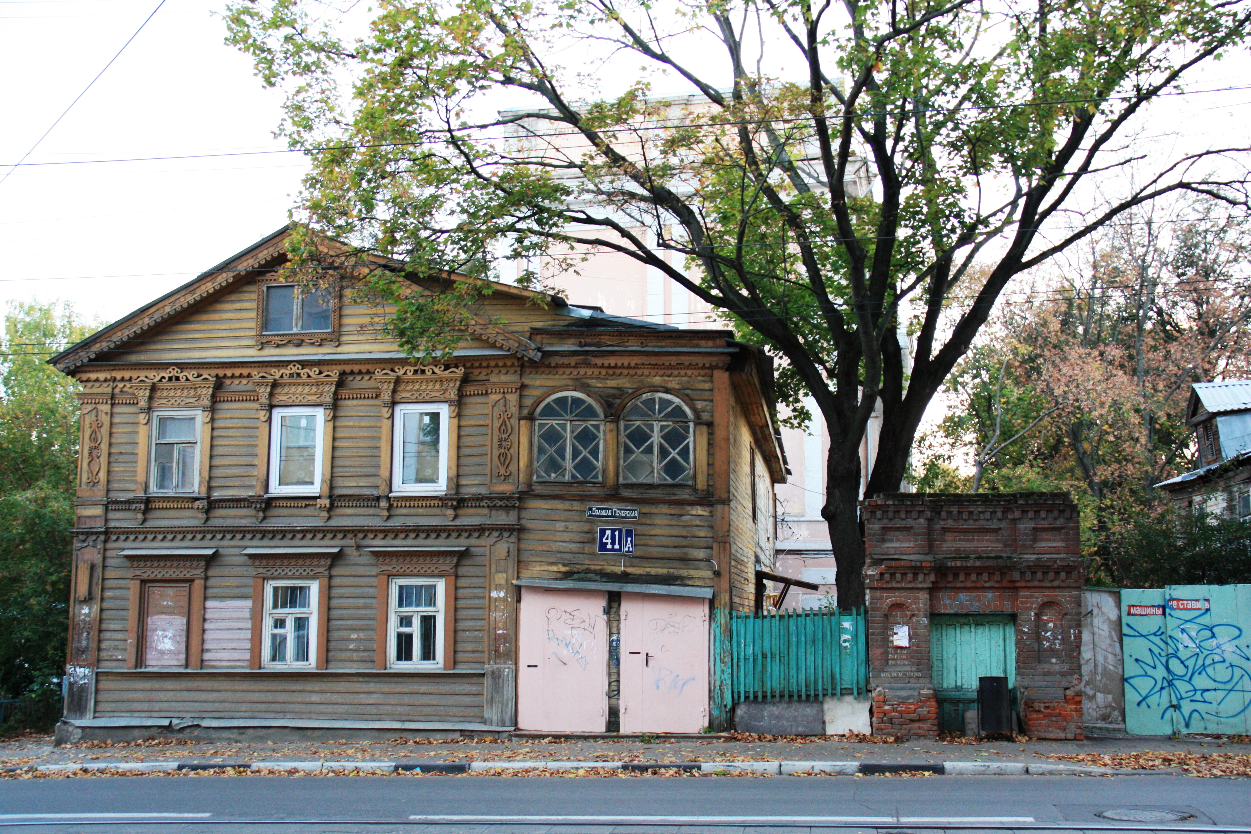 Флигель: улица Большая Печерская, 41-а, Нижний Новгород, Нижегородская область